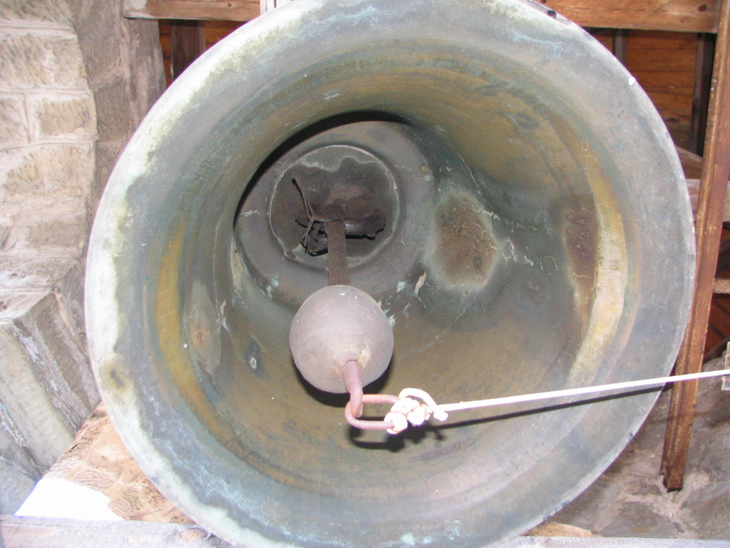 Голямата камбана